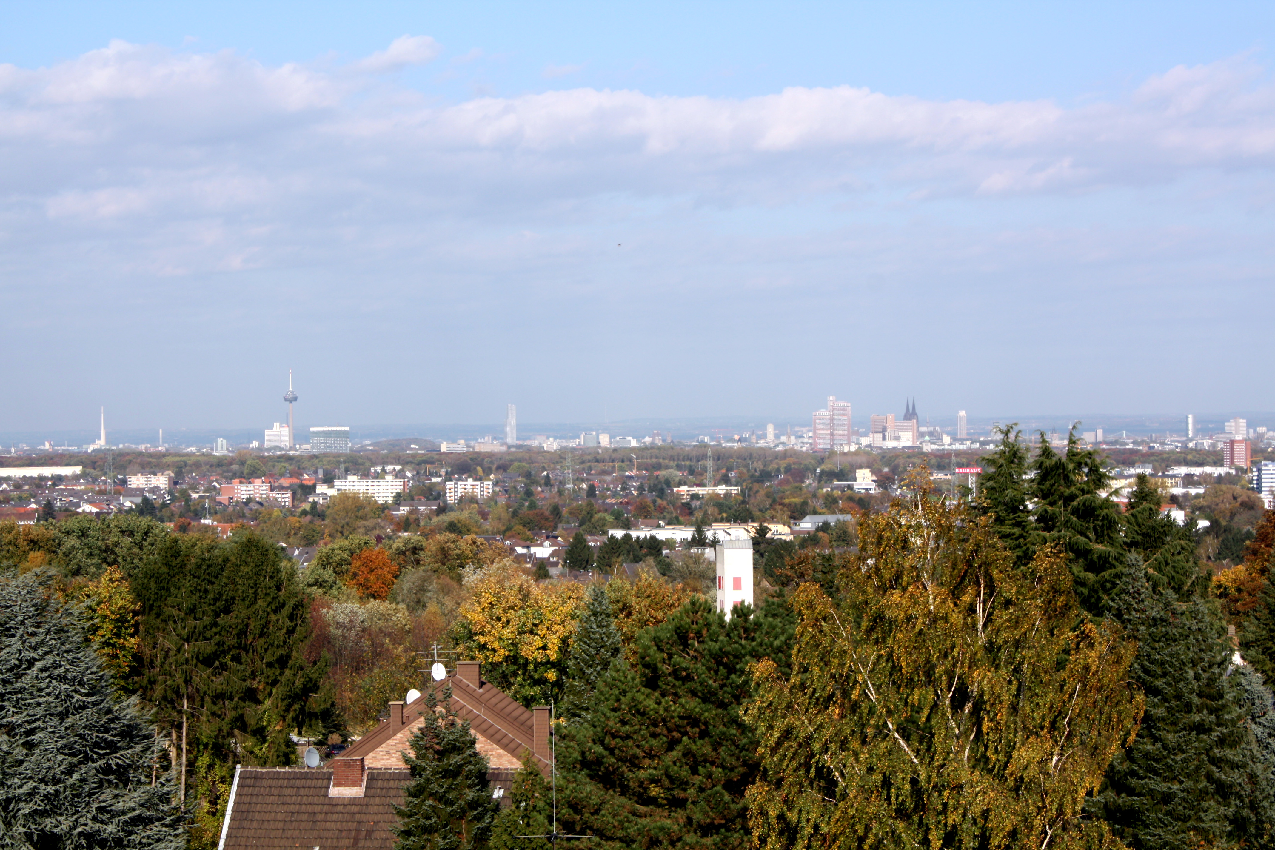 Alt-Hürth, Hürtherberg, Blick nach Norden